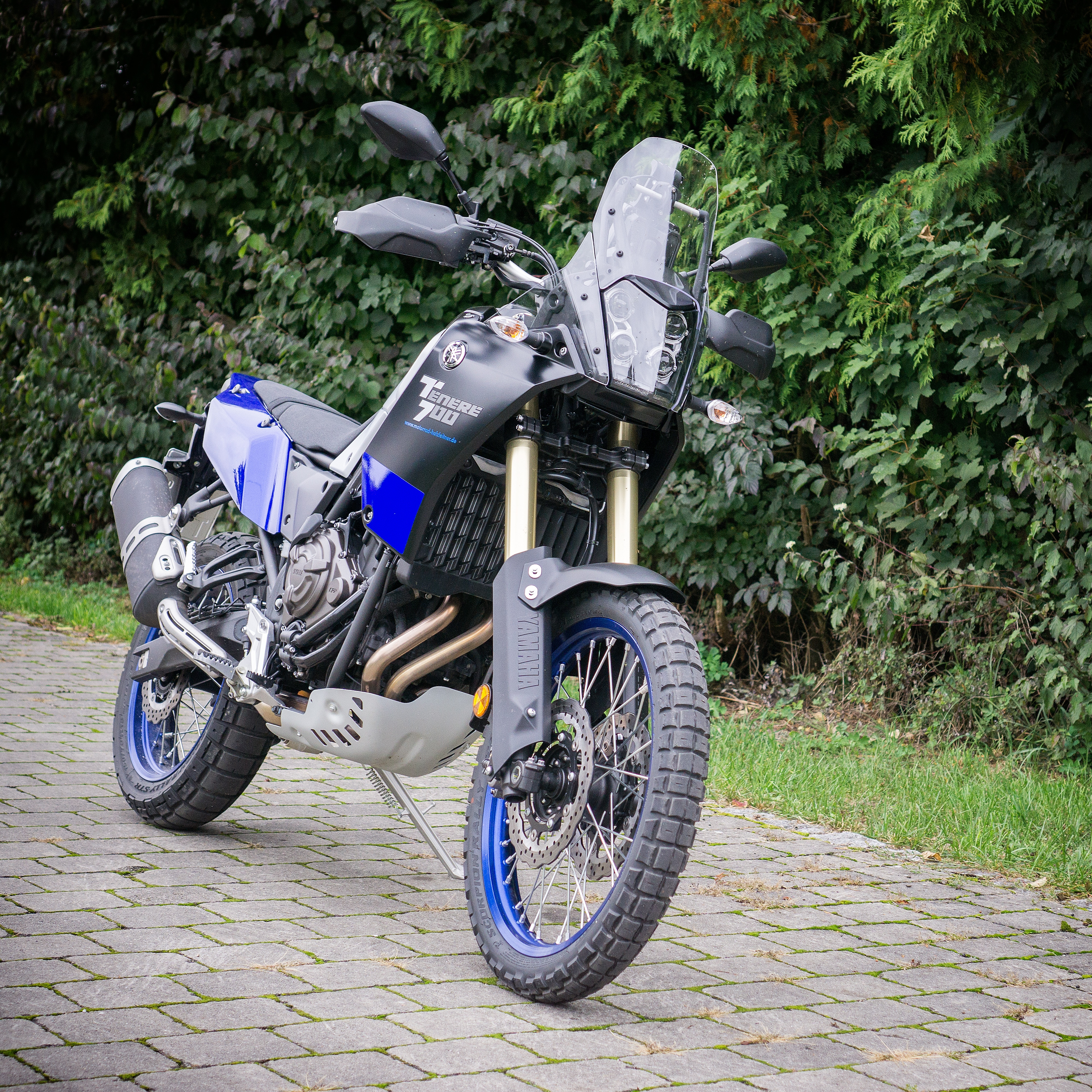 Yamaha Tenere 700 in Ceramic Ice